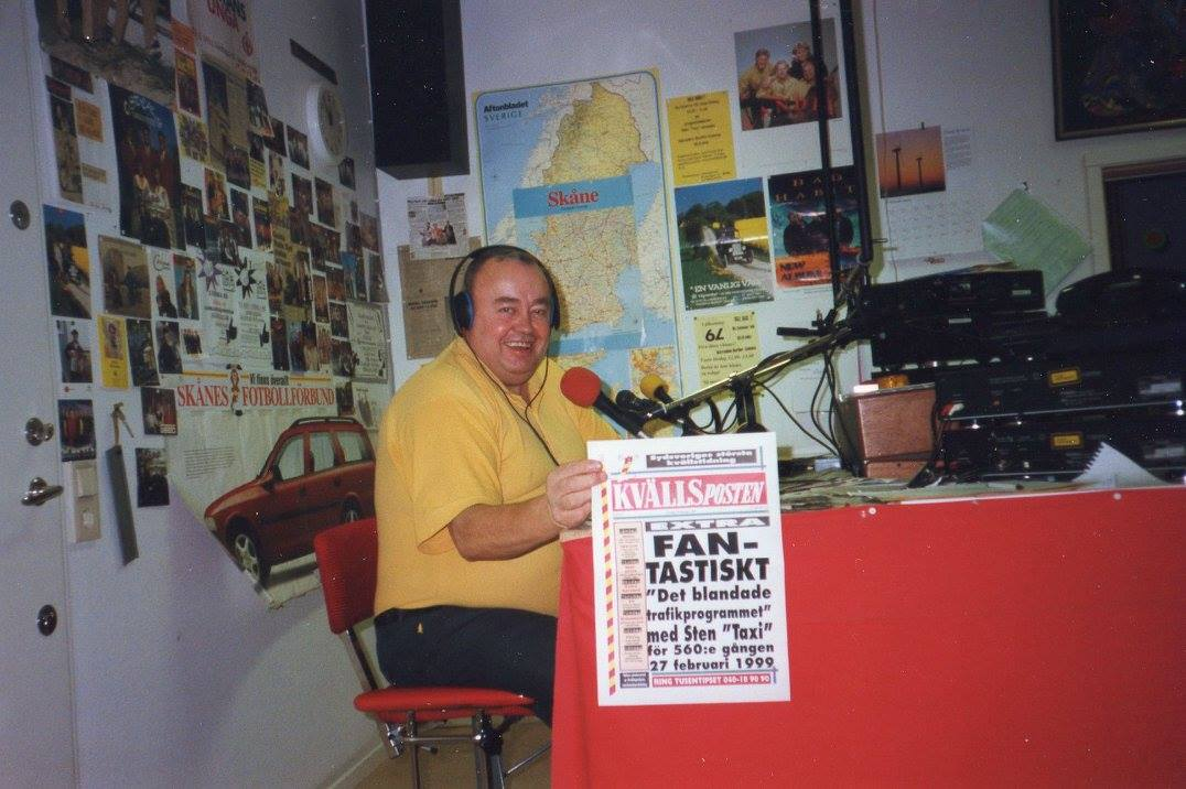 Sten visar upp ett plakat han fått av tidningen Kvällsposten inför sitt 560:e program.